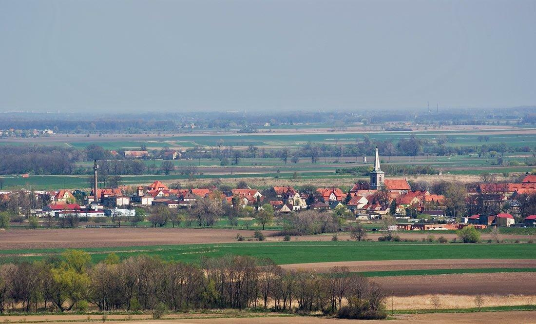 Jordanów Śląski - widok od południa.